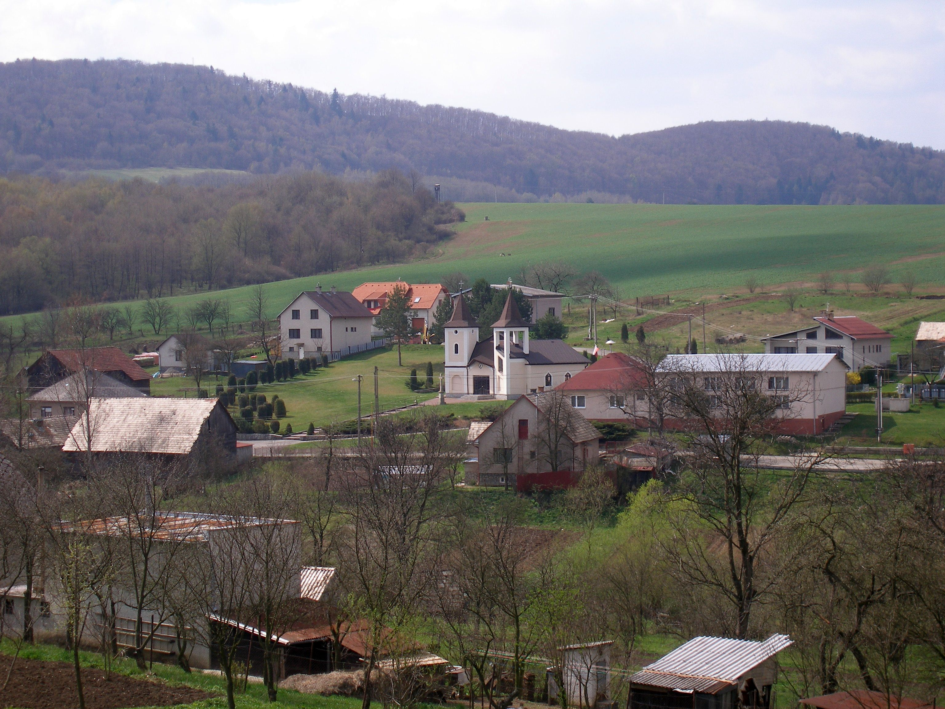 Obec Trnkov okres Prešov, región Šariš